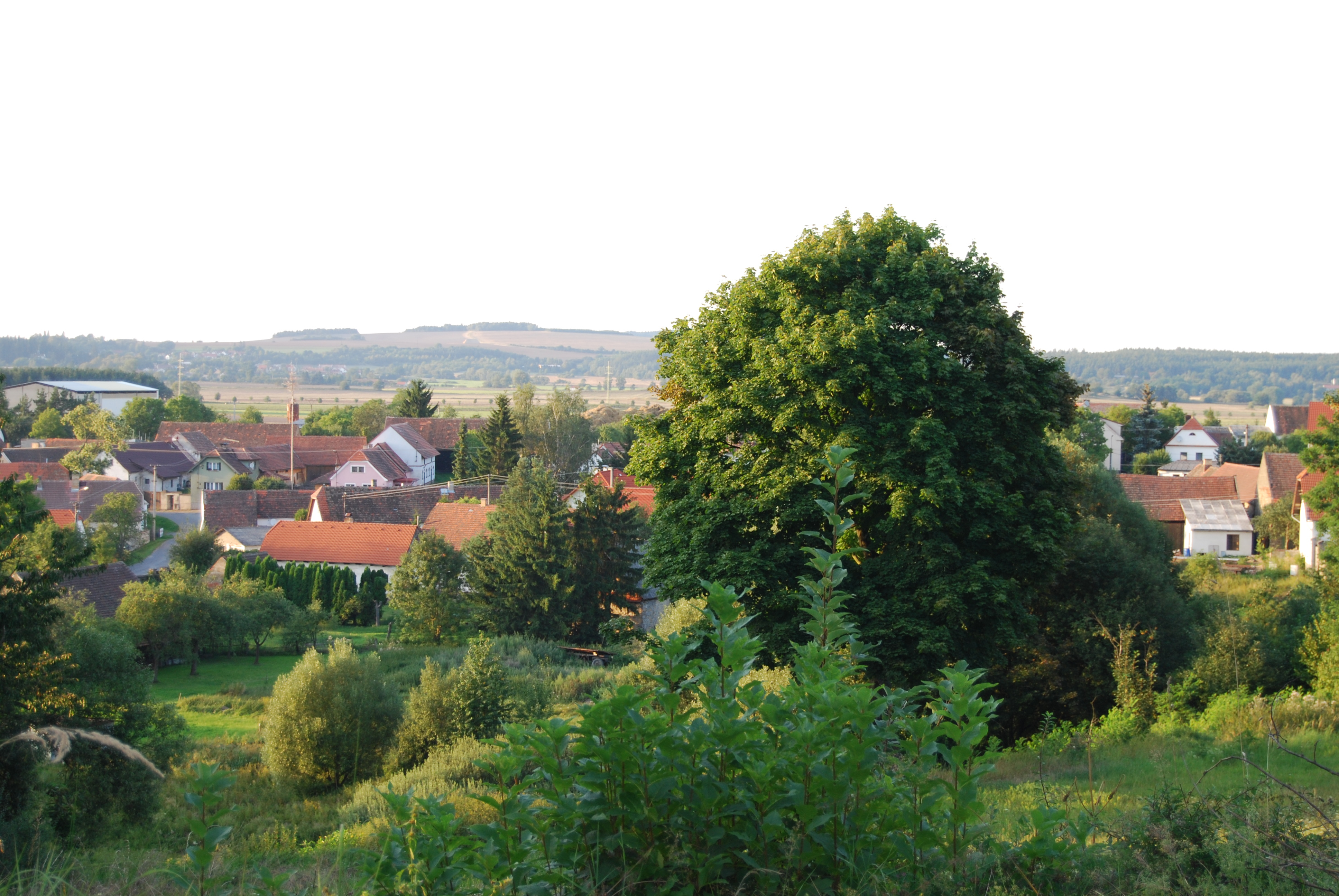 Pohled na obec od vrchu Homole a z přístupové cesty k božím mukám. Lety (okres Písek). Česká republika.